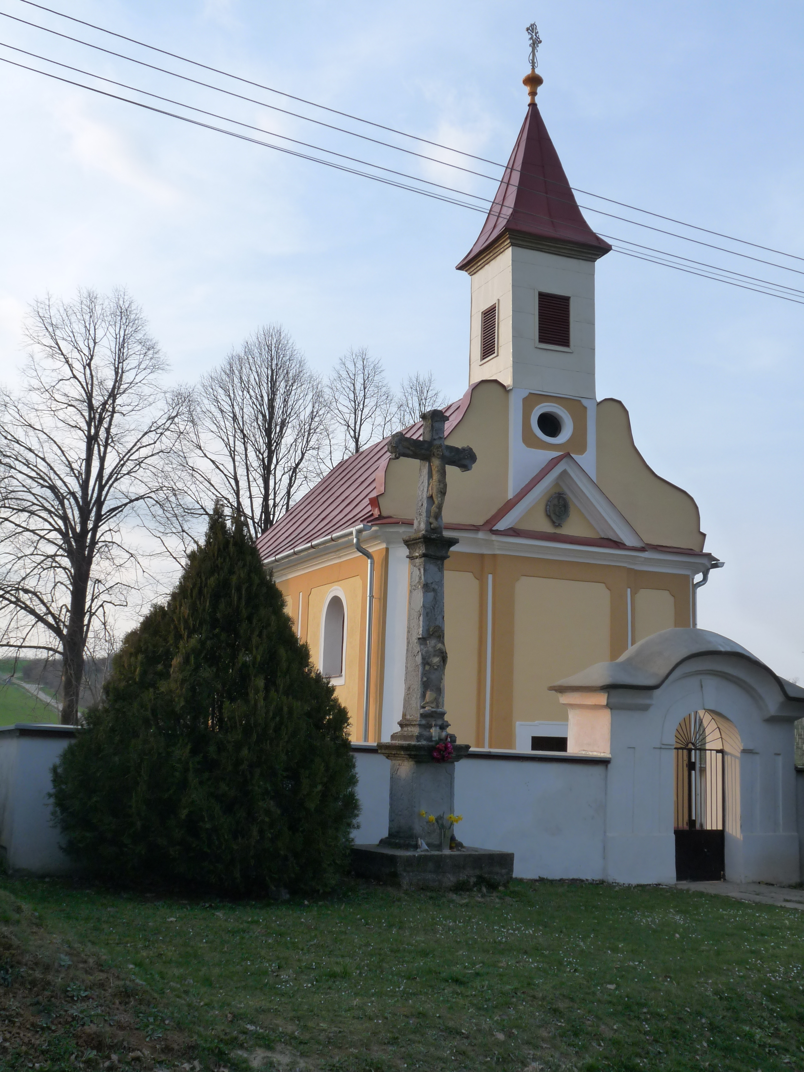 Kostol v Tesároch